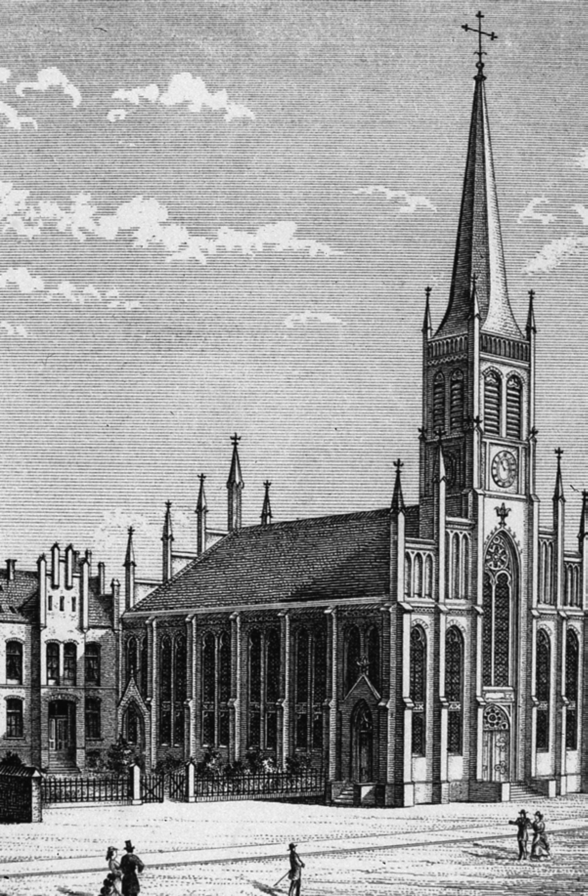 Johanniskirche, Wuppertal-Heckinghausen, Germany. Am 30. Mai 1943 durch Bomben zerstört.